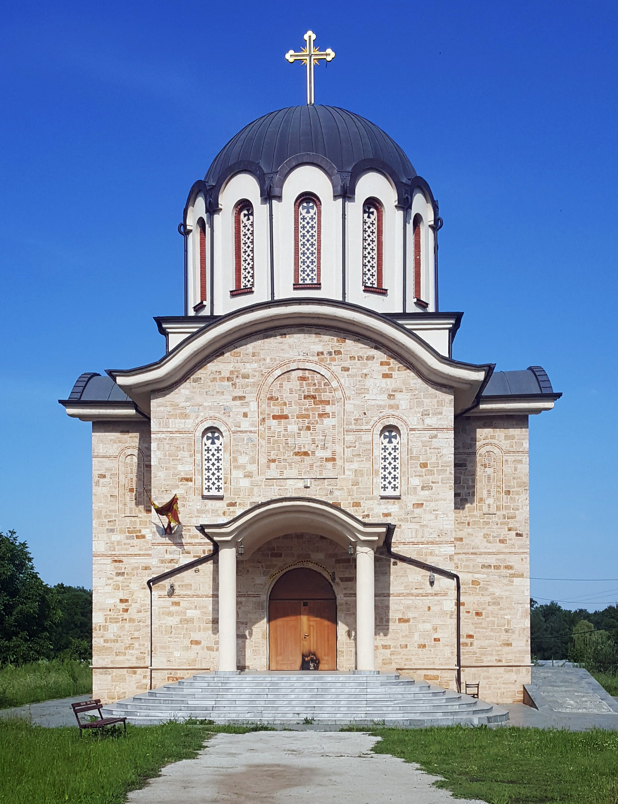 Црквата „Света Злата Мегленска“ во скопската општина Сарај.